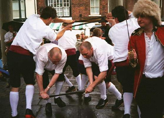 Newcastle Kingsmen Schwerttanzer / Beschreibung: Newcastle Kingsmen beim Aufführen des Grenosider Kettenschwerttanzes (siehe Long Sword Dance). Beverley Folk Festival, England, 1997